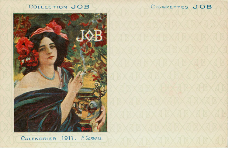 carte postale de Paul Jean Gervais pour la Collection JOB série de 1911